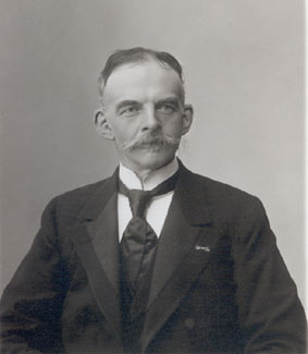 Foto van Carel Coenraad op jongere leeftijd